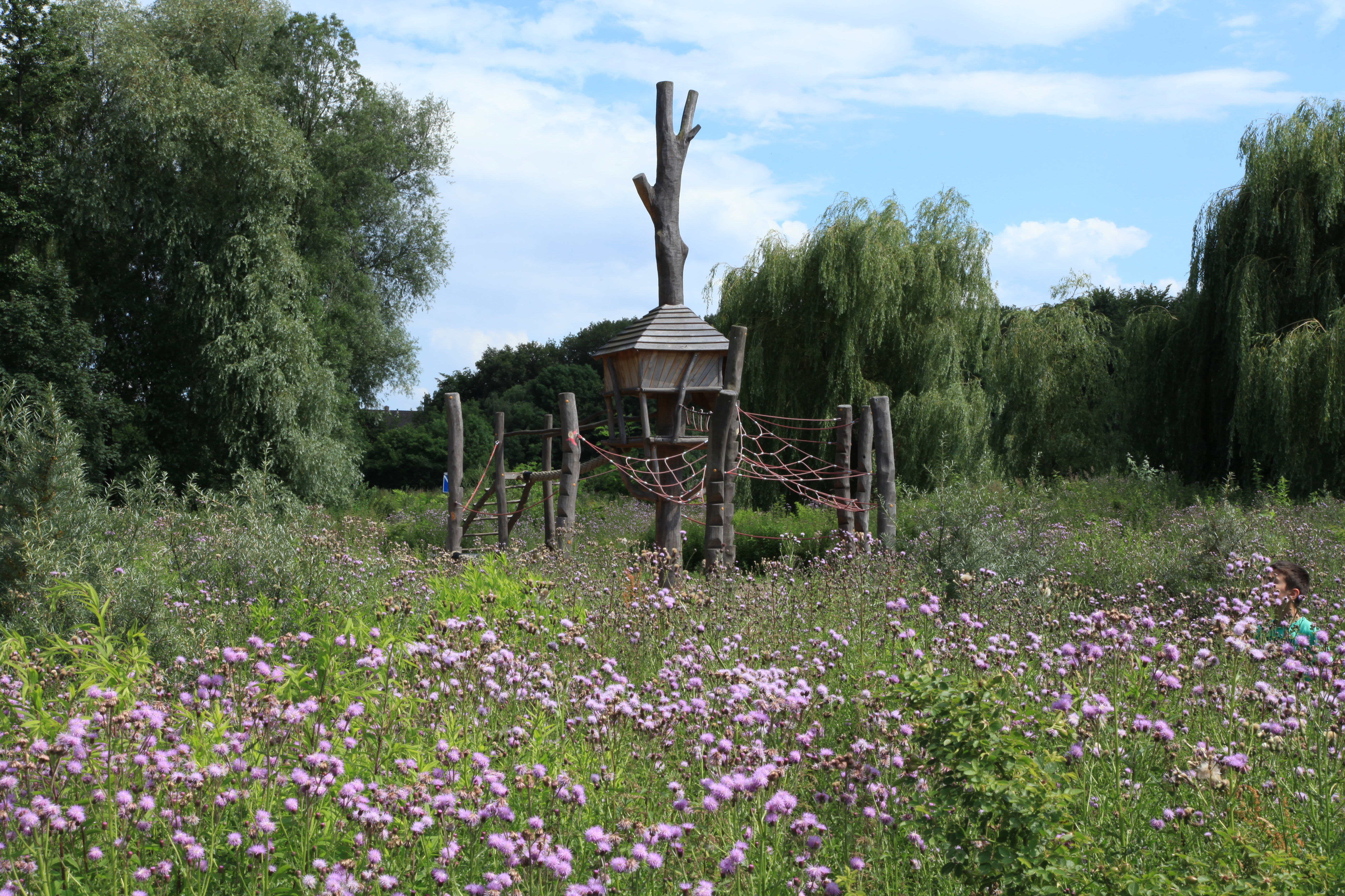 Kulturpark Unser Fritz, Dorstener Straße in Herne